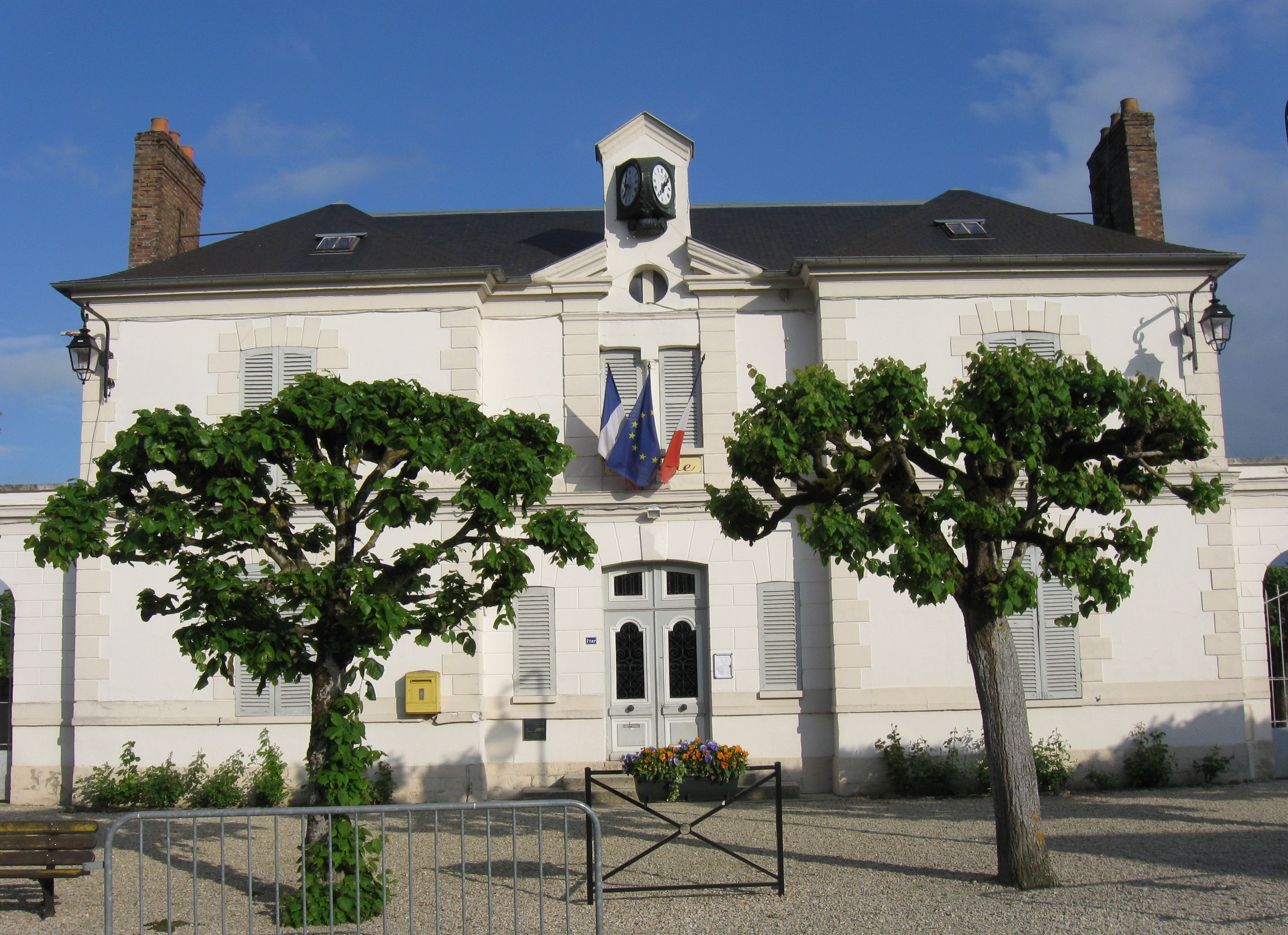 Mairie de Noyen-sur-Seine. (Seine-et-Marne, région Île-de-France).